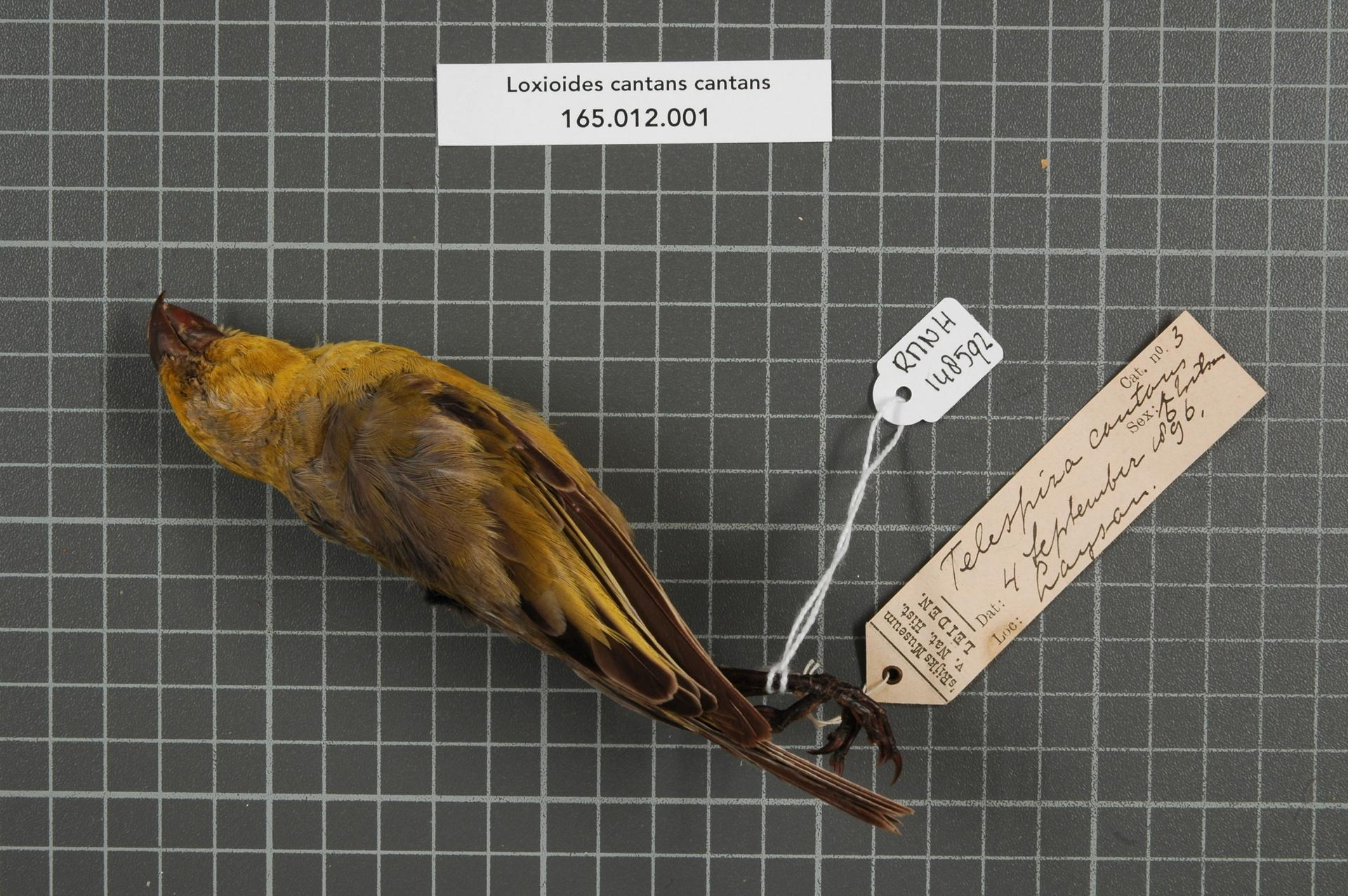 Loxioides cantans cantans (Wilson, 1890)